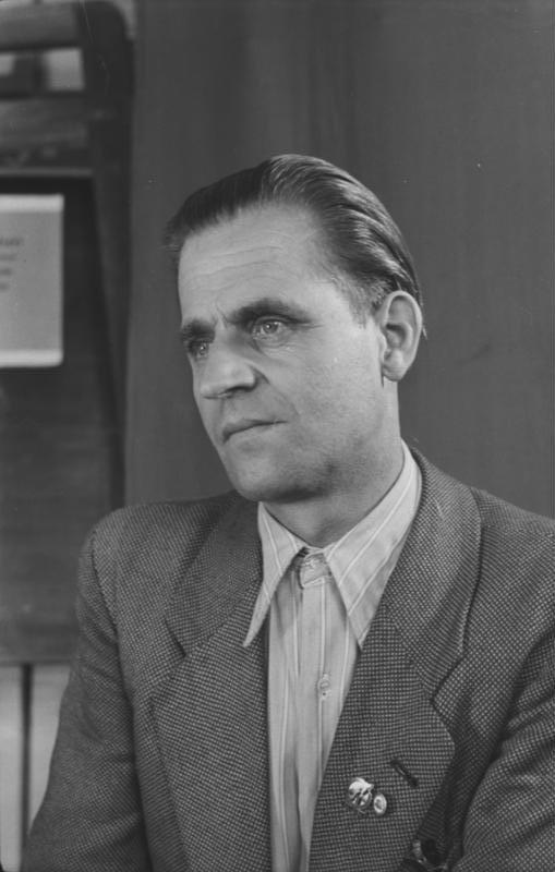 Hans Garbe, Ofenbauer und Maurer ADN-ZB/Quaschinsky 20.9.1950 Der zum Nationalpreis vorgeschlagene Berliner Aktivist, der Ofenmaurer Hans Garbe vom Betrieb Siemens Plania. Abgebildete Personen: Garbe, Hans: Ofenbauer, Maurer, DDR